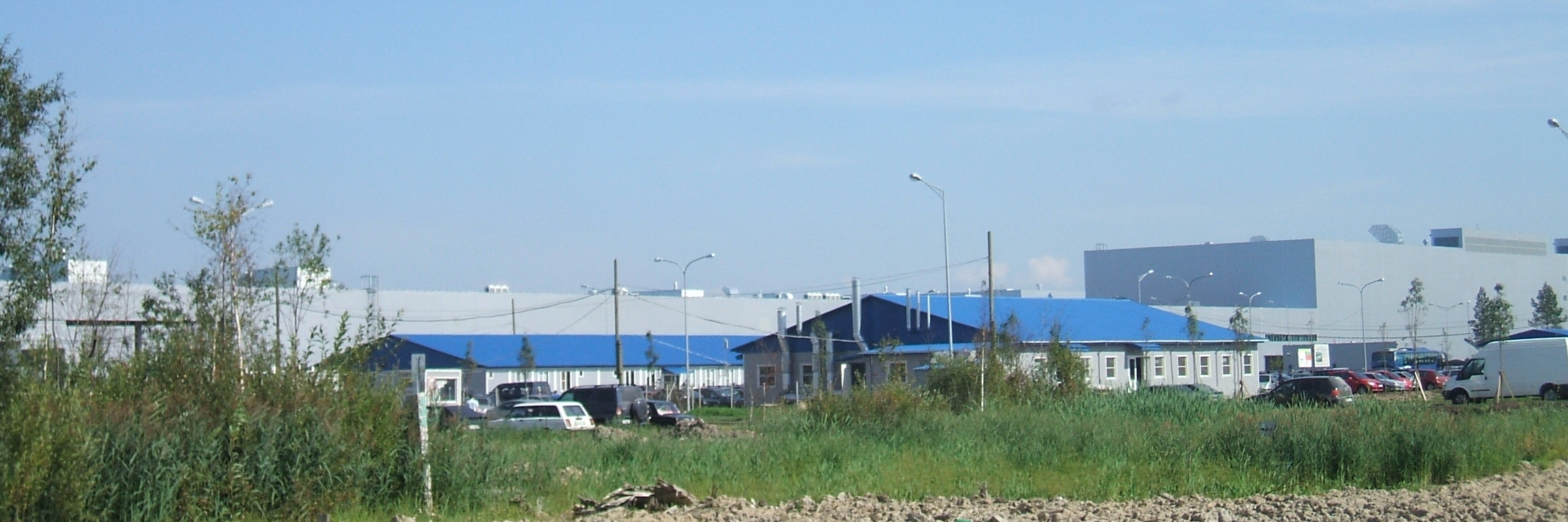 Сестрорецк СПб Автозавод Хёнде